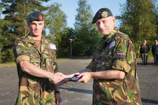 Peter Müllenberg and Mart de Kruif